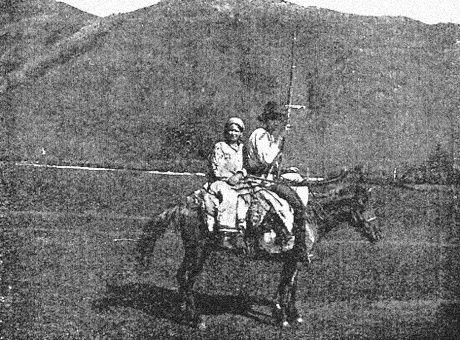 Бухтарминские старообрядцы. Поездка на пашню с косой. Источник: Бухтарминские старообрядцы. Материалы комиссии экспедиционных исследований. Серия Казахстанская. Вып. 17. Л., 1930.